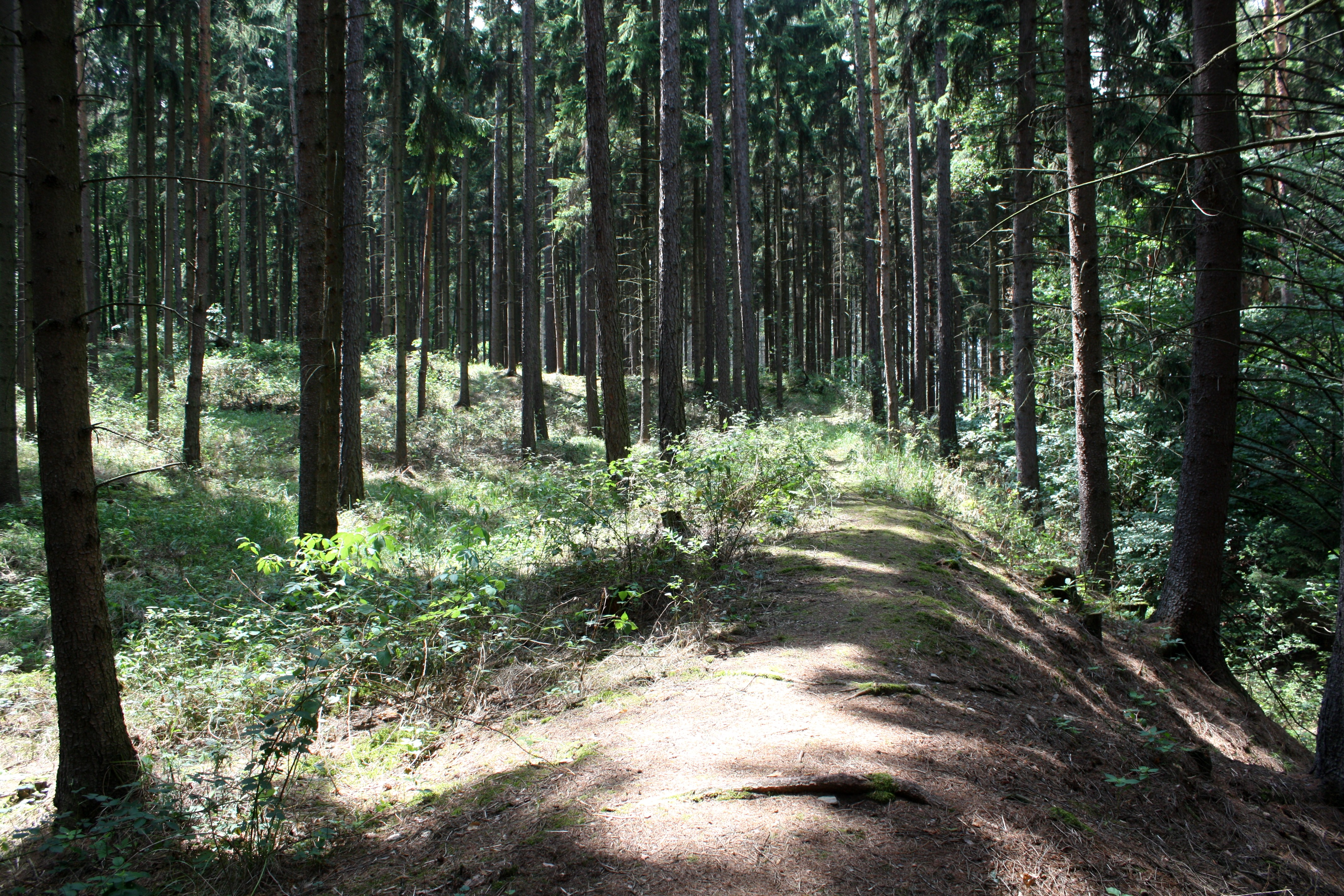 Severovýchodní roh valů viereckschanze u Ludéřova na Olomoucku